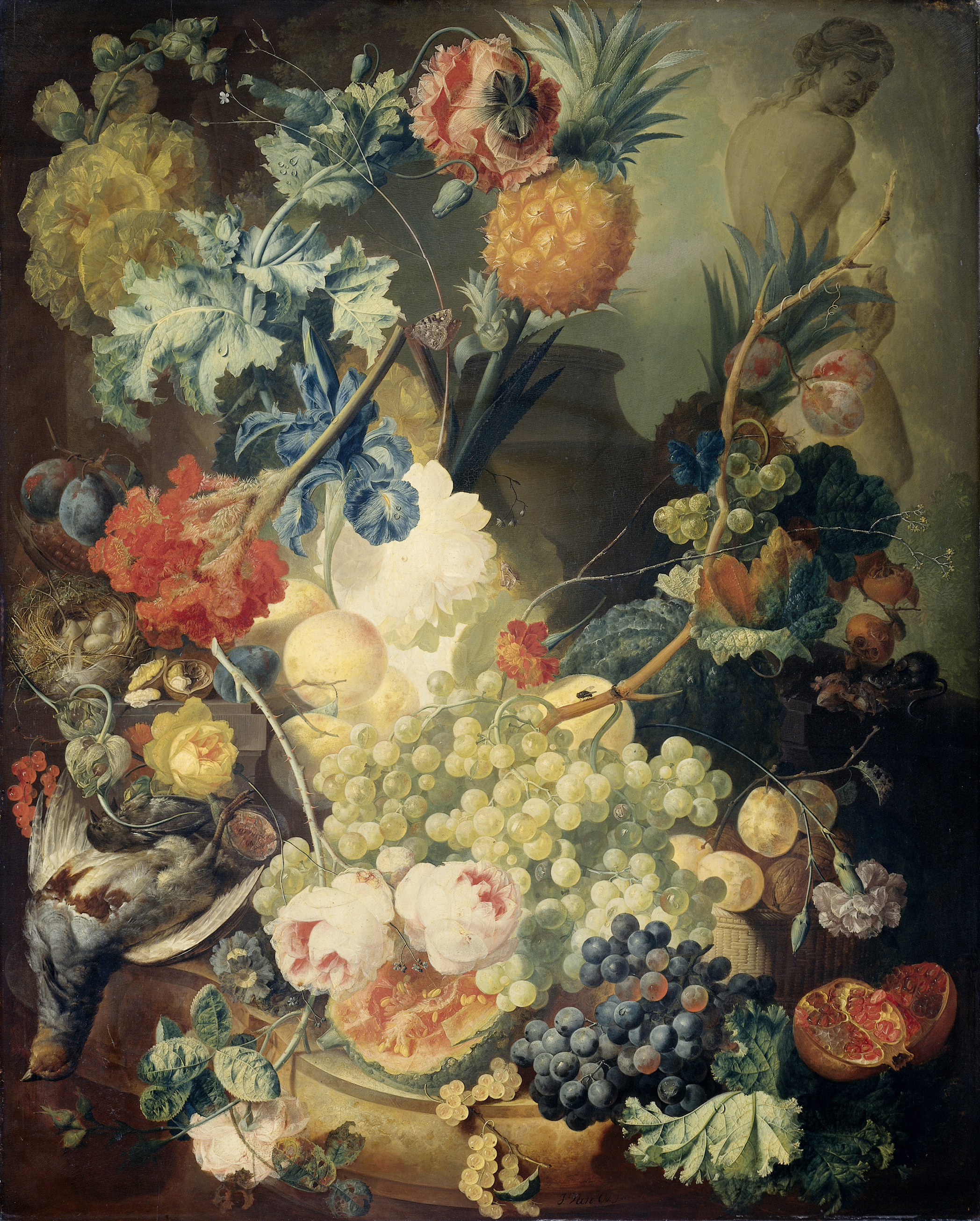 Stilleven met bloemen (papavers, irissen, hanekammeen, anjers en rozen), vruchten (druiven, pruimen, abrikozen, granaatappel, perziken, ananas en noten) en gevogelte. Op de achtergrond rechts een beeld van een vrouw en een tuinvaas. Rechts knaagt een muis aan een noot, links een vogelnestje met eieren. Tussen de bloemen zitten vlinders en een vlieg.